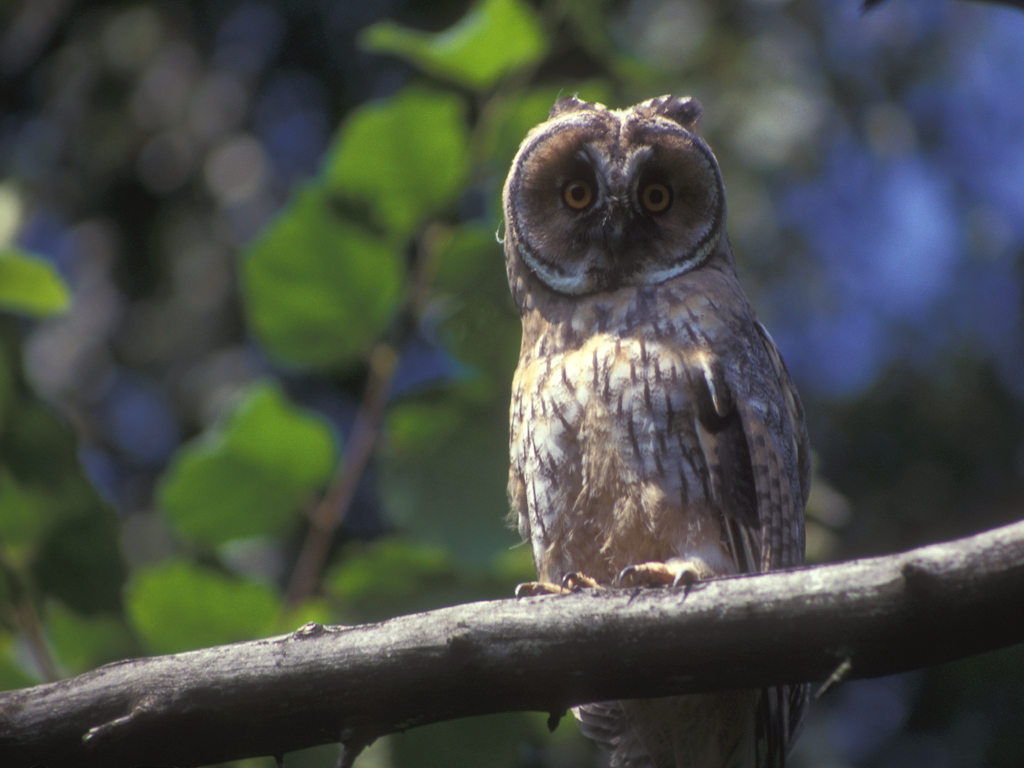 Asio otus, Strumień, Poland